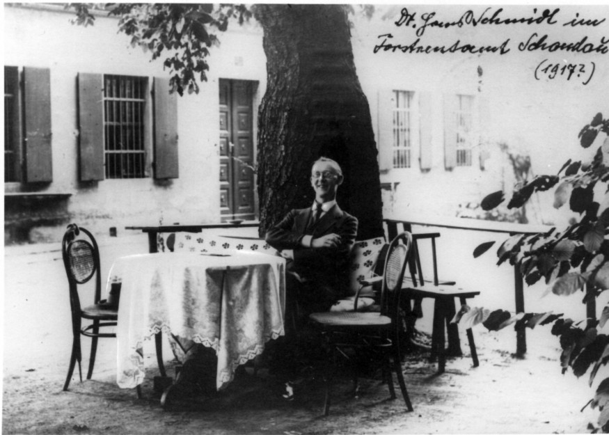 Hans Schmidt im Fortstrentamt, um 1917